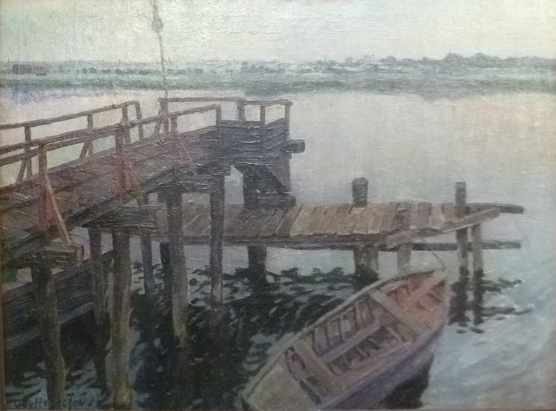 "Rivierzicht met aanlegsteiger", olieverf op doek (82 x 111 cm) door de Belgische kunstschilder Victor Uytterschaut (1847-1917); privécollectie